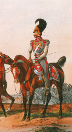 Kurhessische Garde du Corps